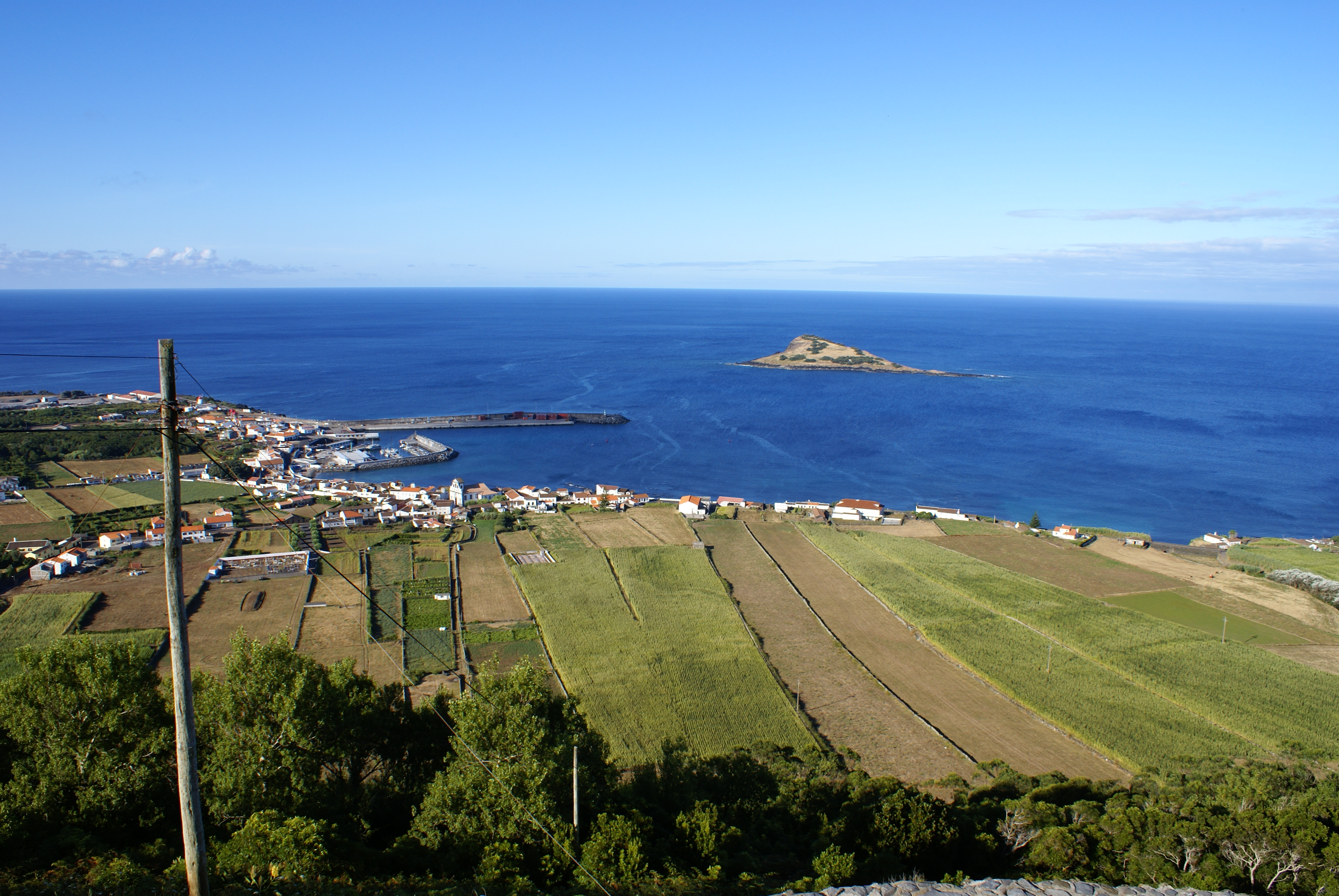 Vila da Praia da Graciosa, vista parcial, o ilhéu da Praia como Pano de Fundo, ilha Graciosa, Açores, Portugal.